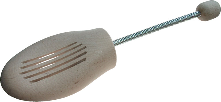 Motiv: Schuhspanner aus Holz mit Metallspannfeder. Fotograf: KMJ Aufnahmedatum: 2004-06-19 Aufnahmeort: Studio Bildname: Schuhspanner_01_KMJ.jpg Bildgröße: 768 Pixel x 354 Pixel (26.157 Bytes)